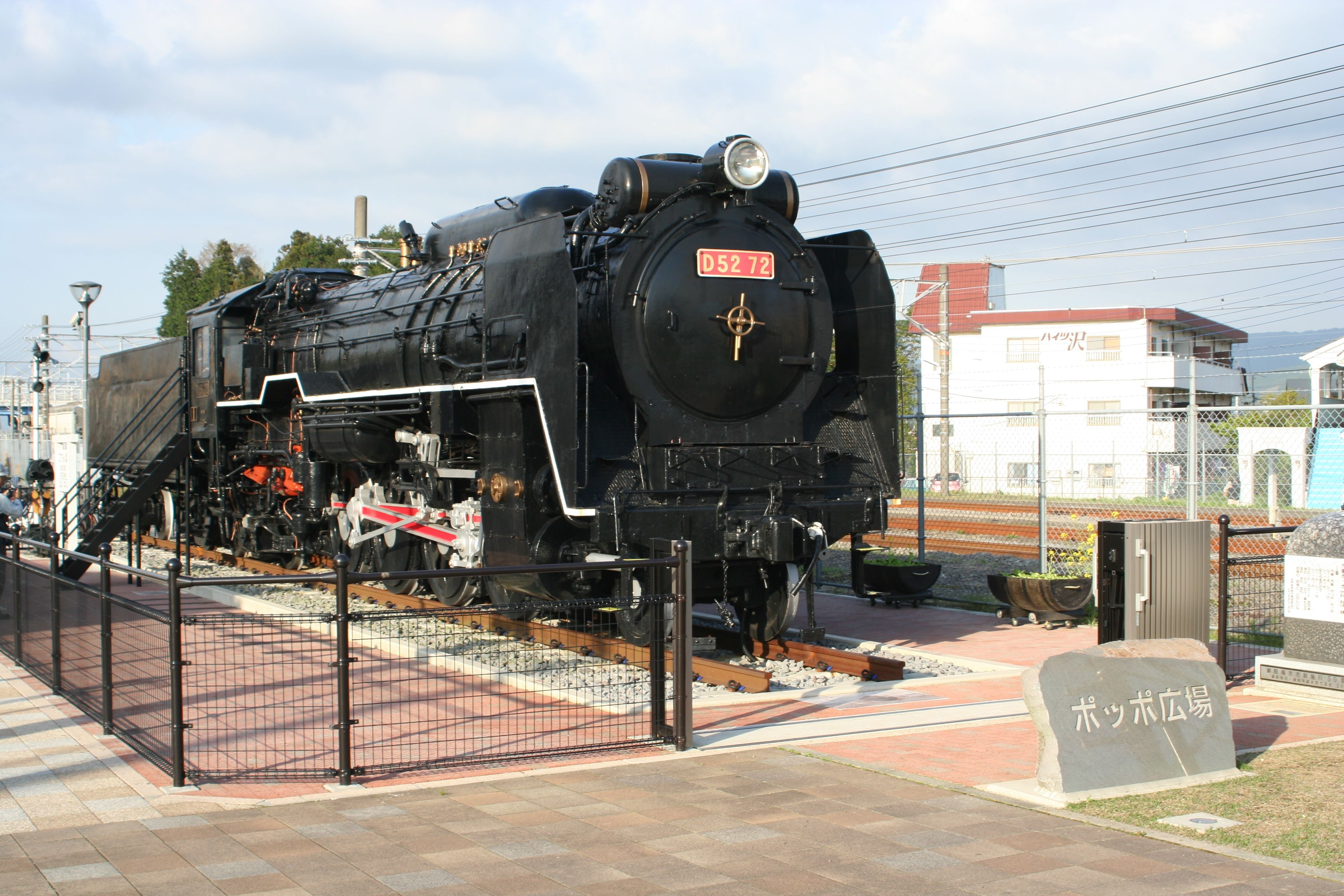 国鉄D52形蒸気機関車72号機